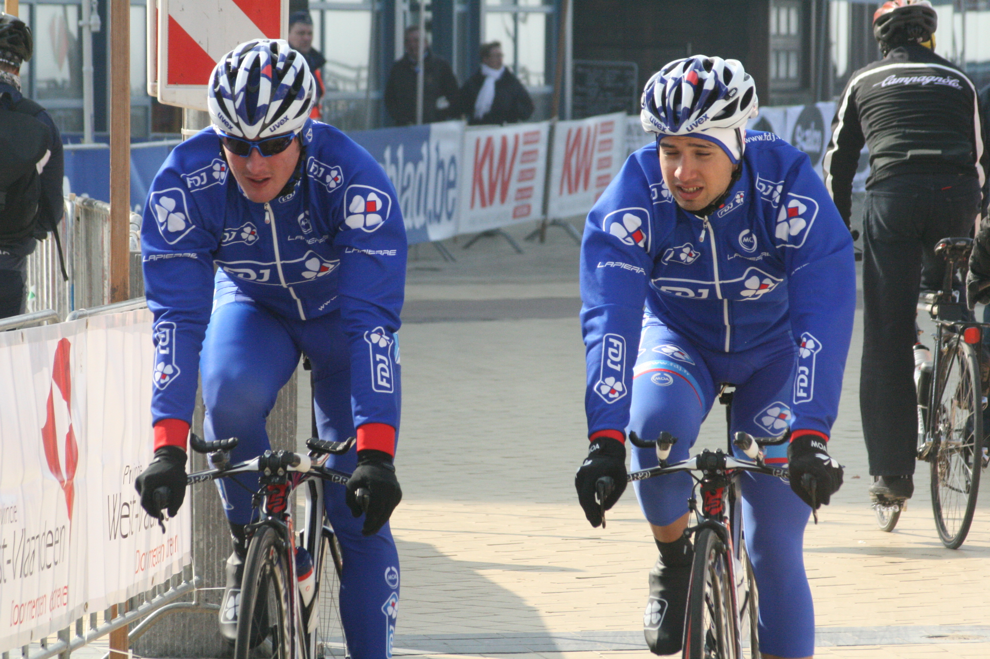 Driedaagse van West-Vlaanderen 2011, proloog in Middelkerke